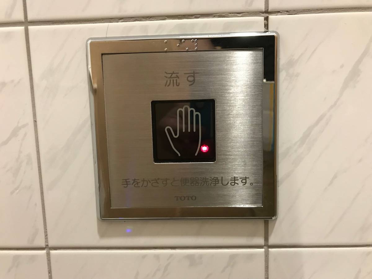 手かざしセンサー